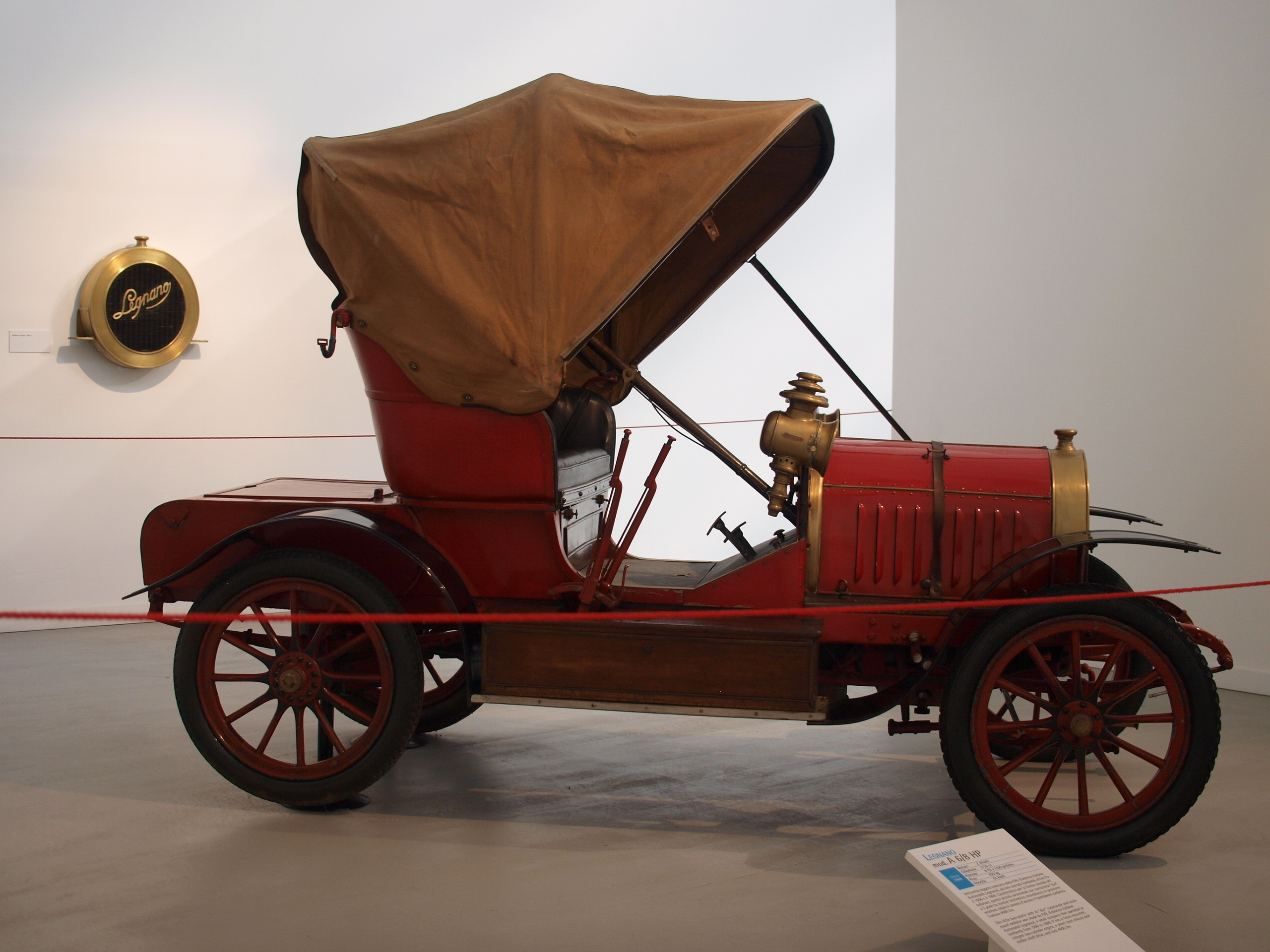 L'evolutione dell'automobile Legnano A 6/8 HP - Italy 1908